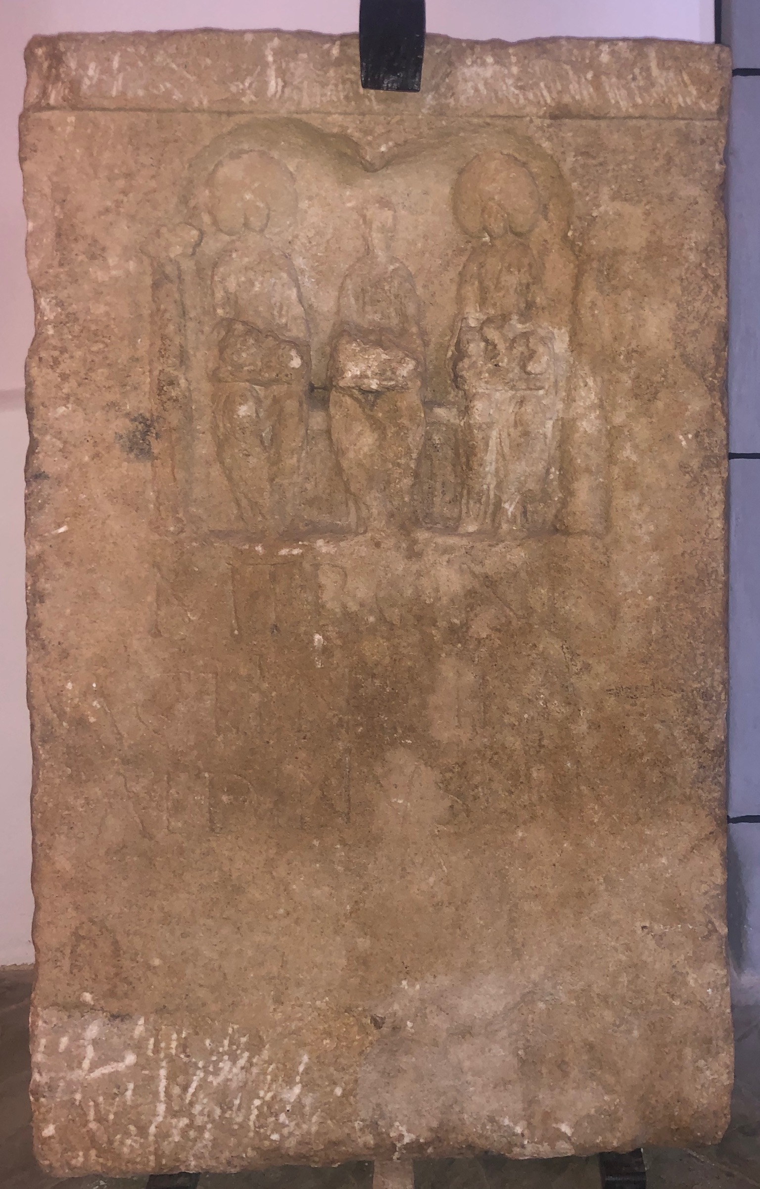 Matronenstein in St. Cyriacus in Weyer, Mechernich, Deutschland